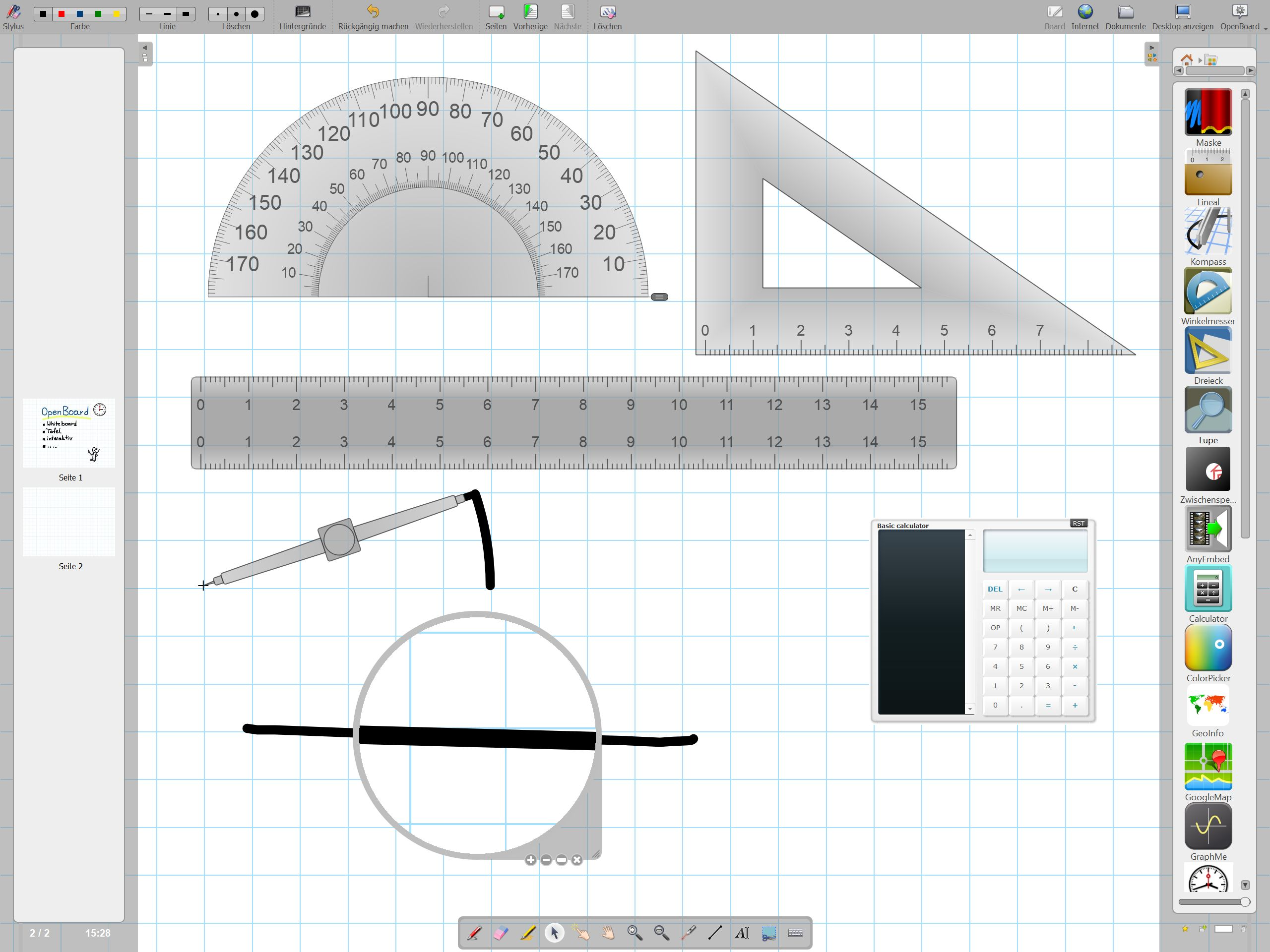 Screenshot der Software Openboard mit Werkzeugen